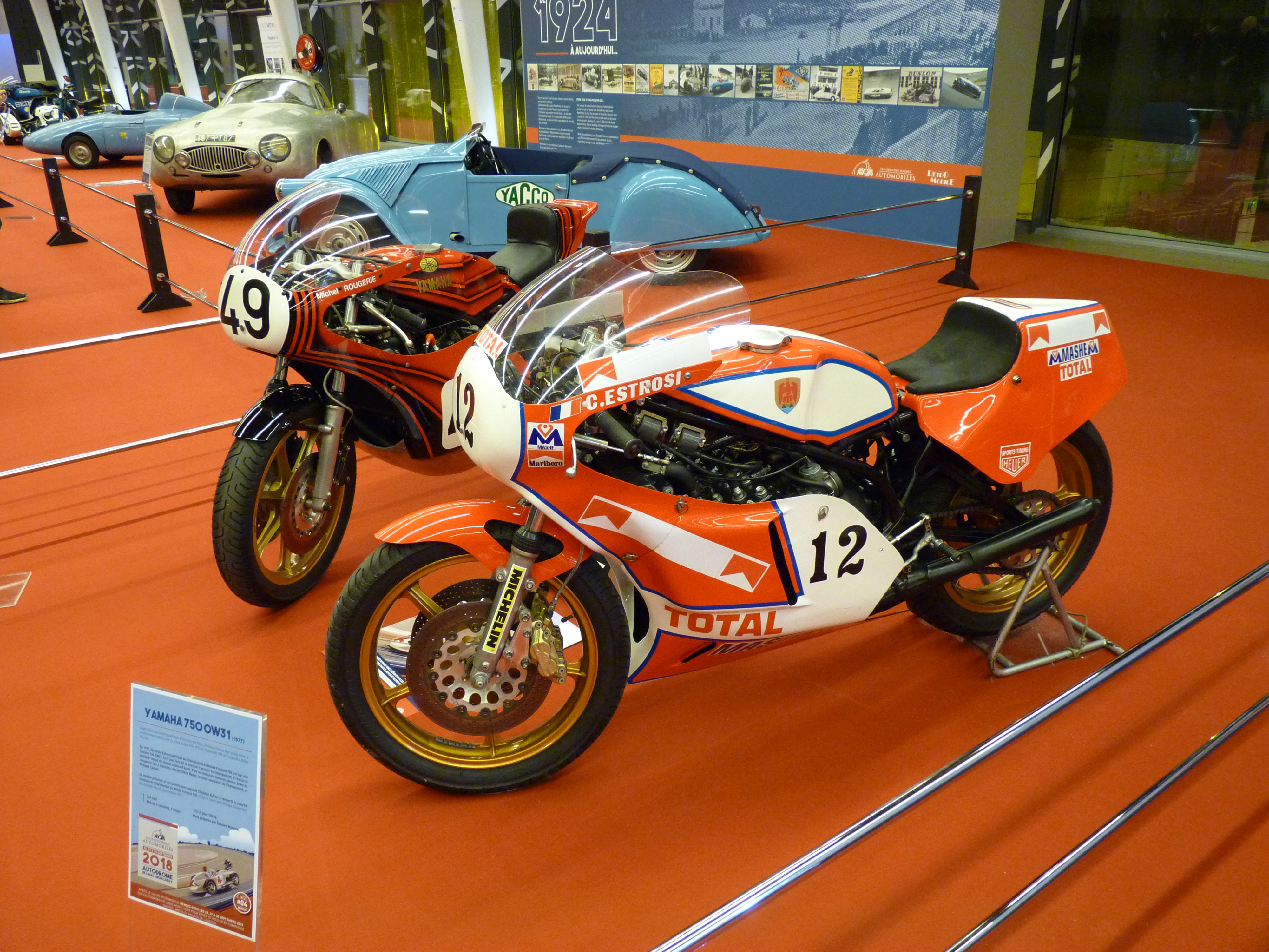 Les Grandes Heures Automobiles à Rétromobile 2018